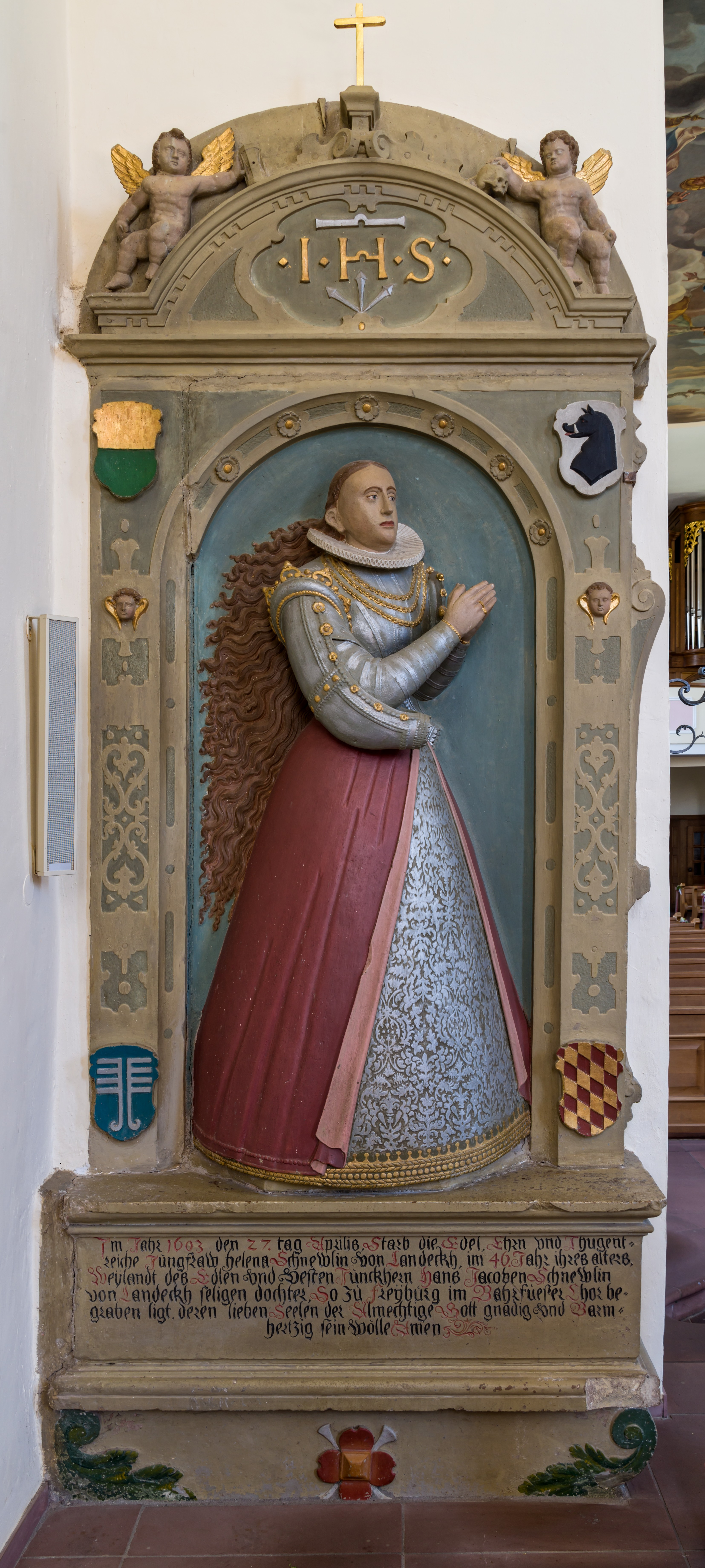 Bilder aus Oberried Grabstein der Helena Schnewlin 1603